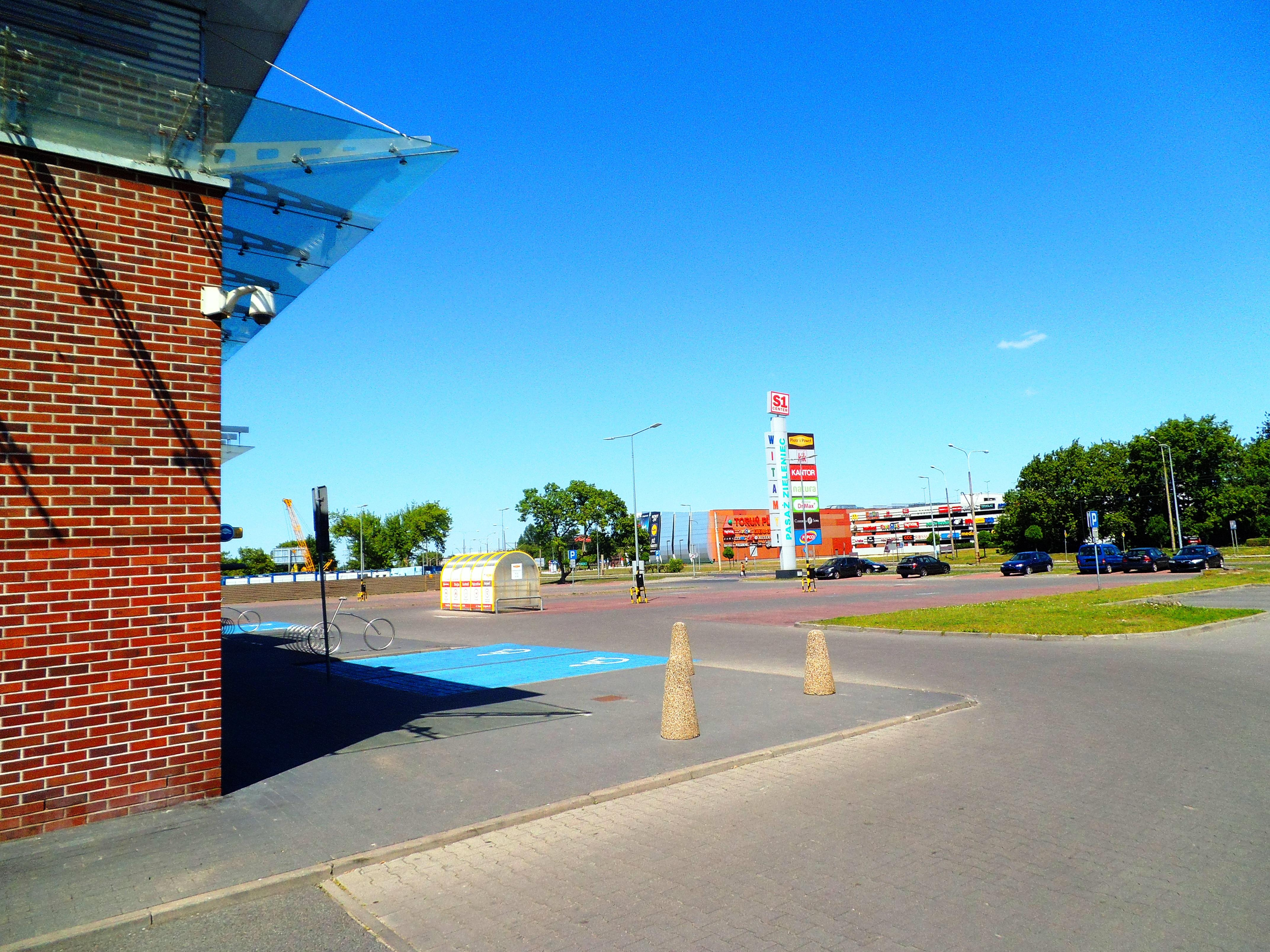 Park Handlowy Zieleniec w Toruniu, parking